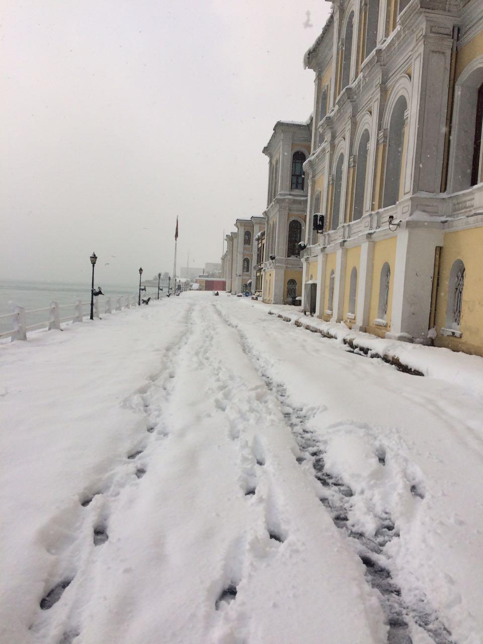 Kabataş erkek lisesi kış